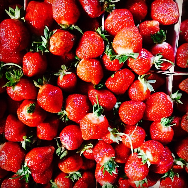 Östgöta jordgubbar